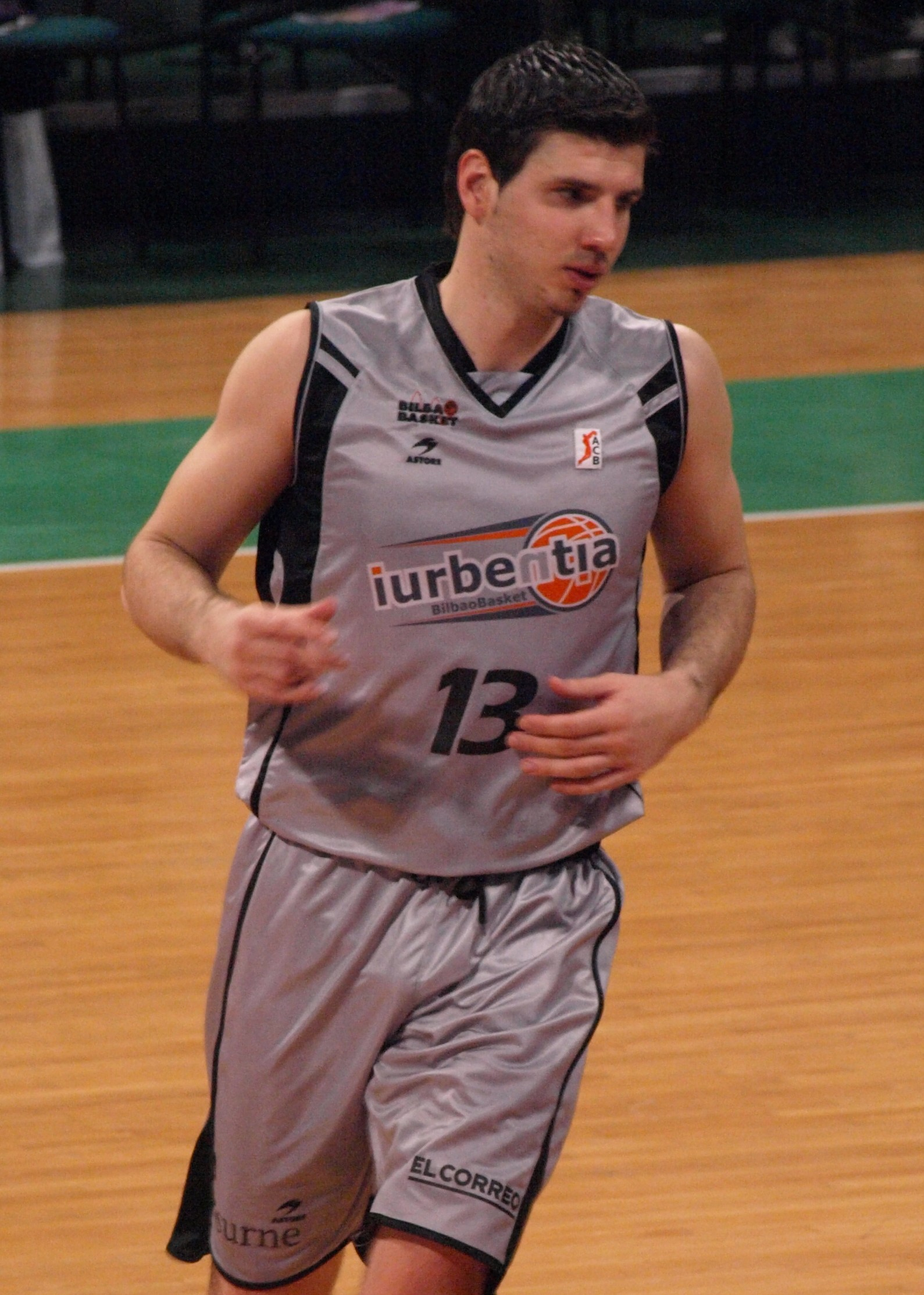 Marko Banic en el encuentro que enfrentó al Iurbetia Bilbao con el DKV Joventut de la liga ACB 2008/09 en el olímpico de Badalona